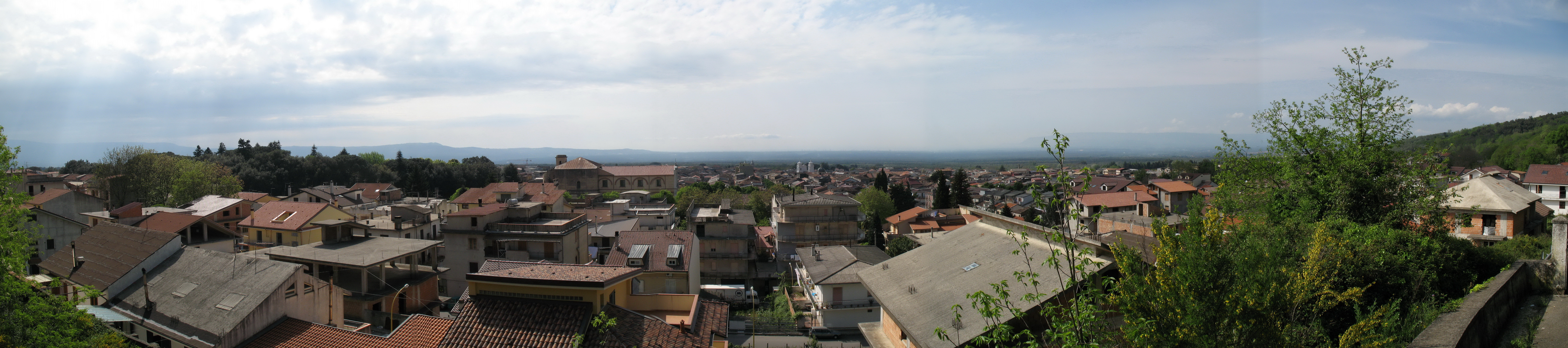 Vista Panoramica di Cittanova (RC)